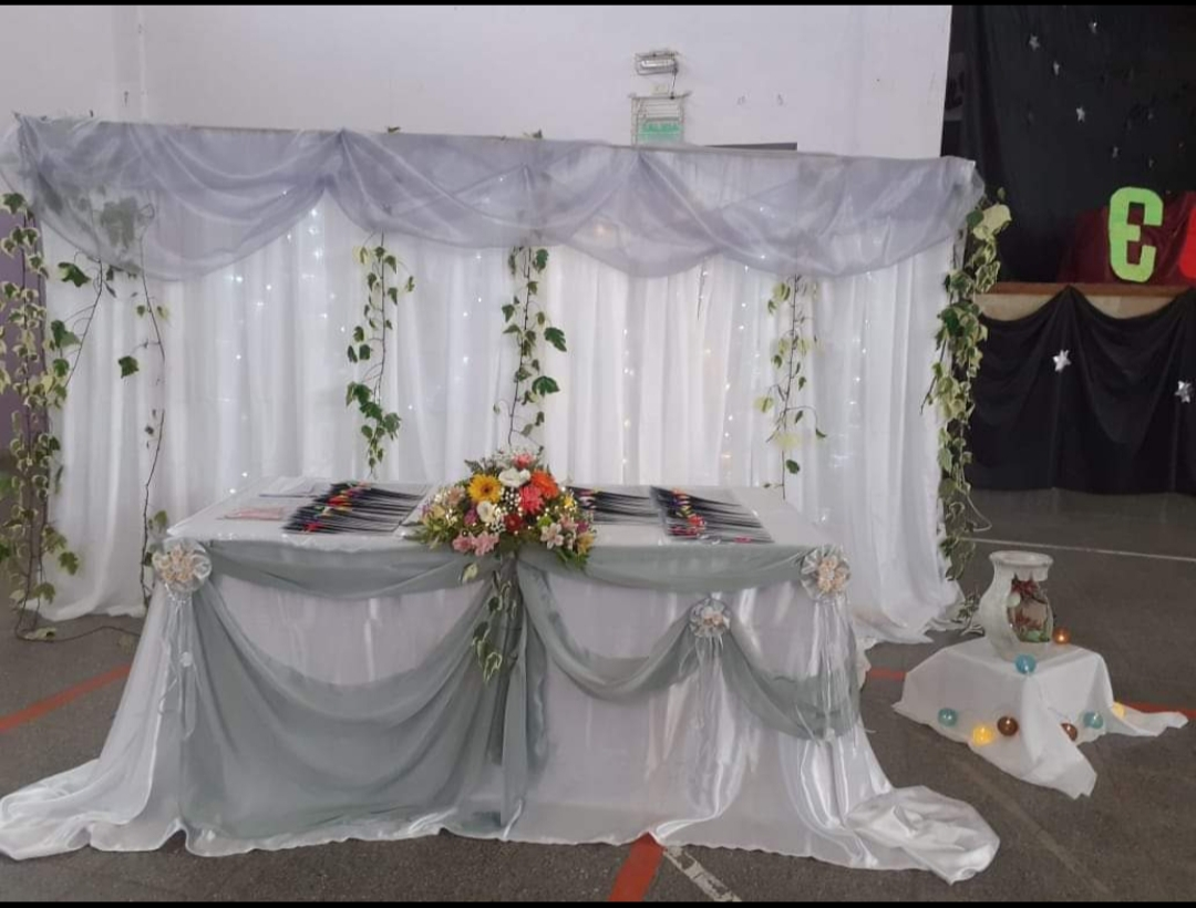 Es un rincón del salón, donde se lleva a cabo el acto académico, destinado a la organización de diplomas y medallas de los egresados de la ESRN N° 58.